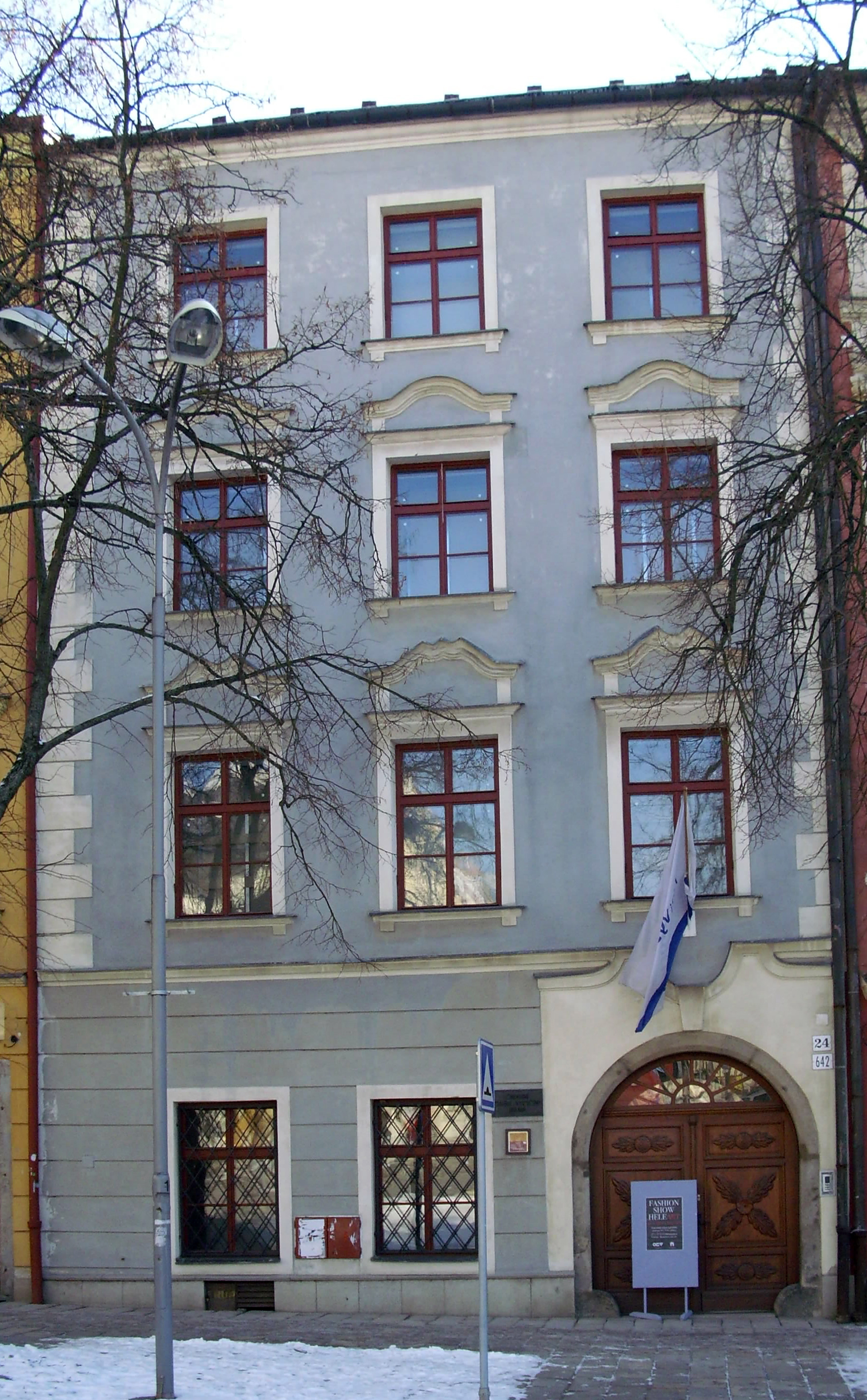 Masarykovo náměstí 24, Jihlava